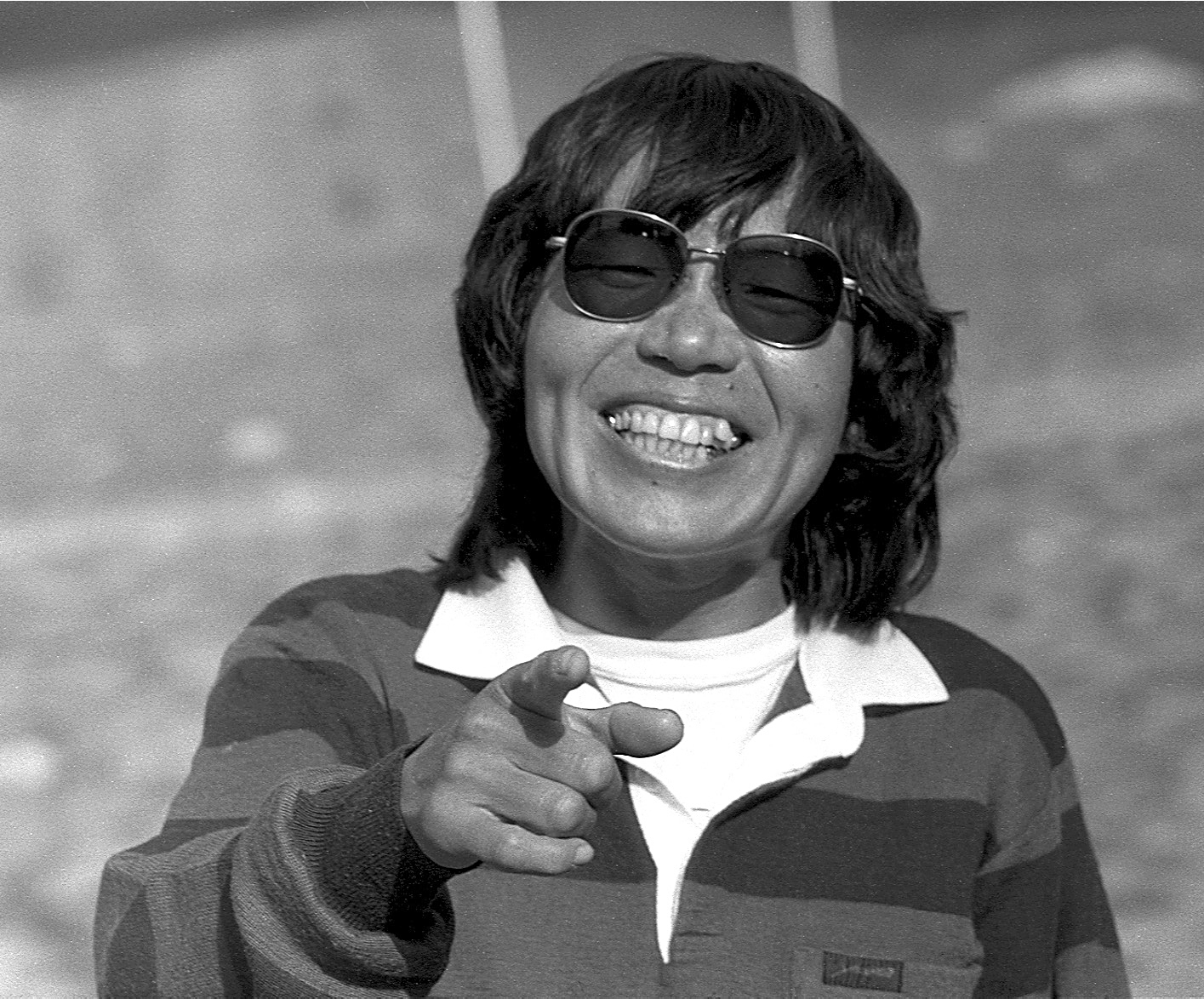 Junko Tabei, Jaapani alpinist Pamiiris 85